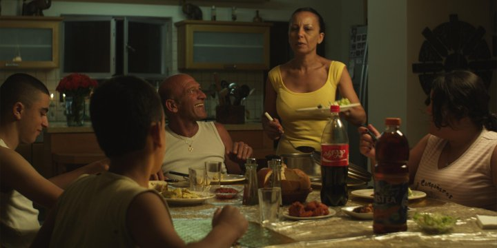 תמונה מתוך הסרט עיניים כאלה